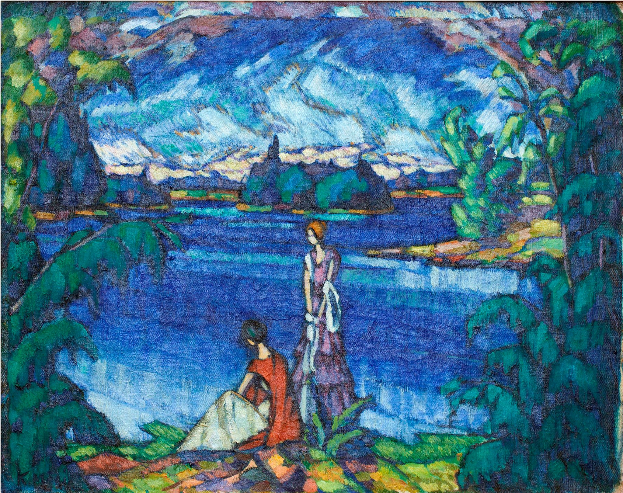 Üks kahest 2016. aastal "avastatud" seniteadmata Konrad Mägi maalist, mis kuulub erakogusse ja mida oktoobris 2016 eksponeeriti Tartu Kunstimuuseumis näitusel "Tundmatu Konrad Mägi".